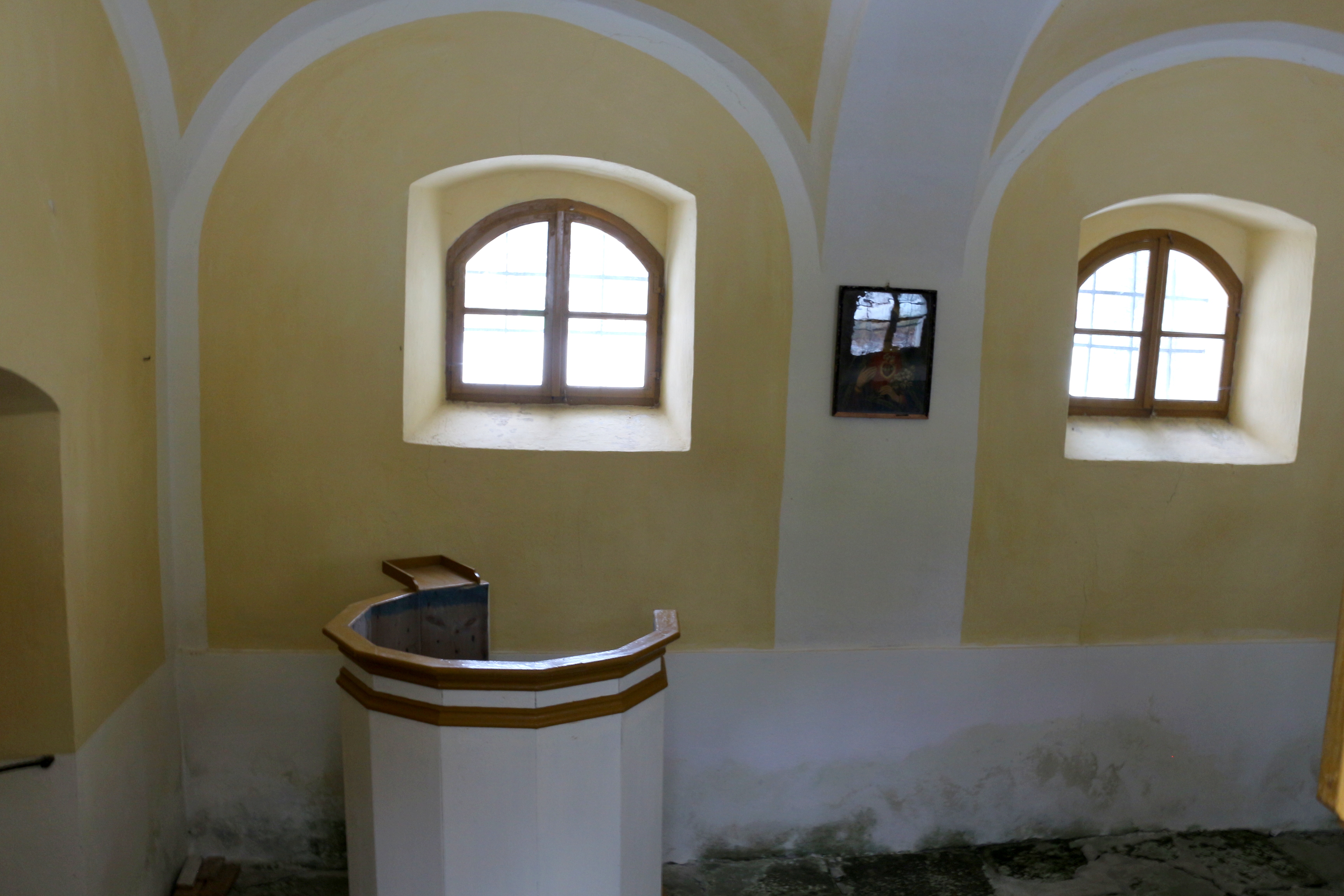 Zámecká kaple sv. Václava v Jindřichovicích